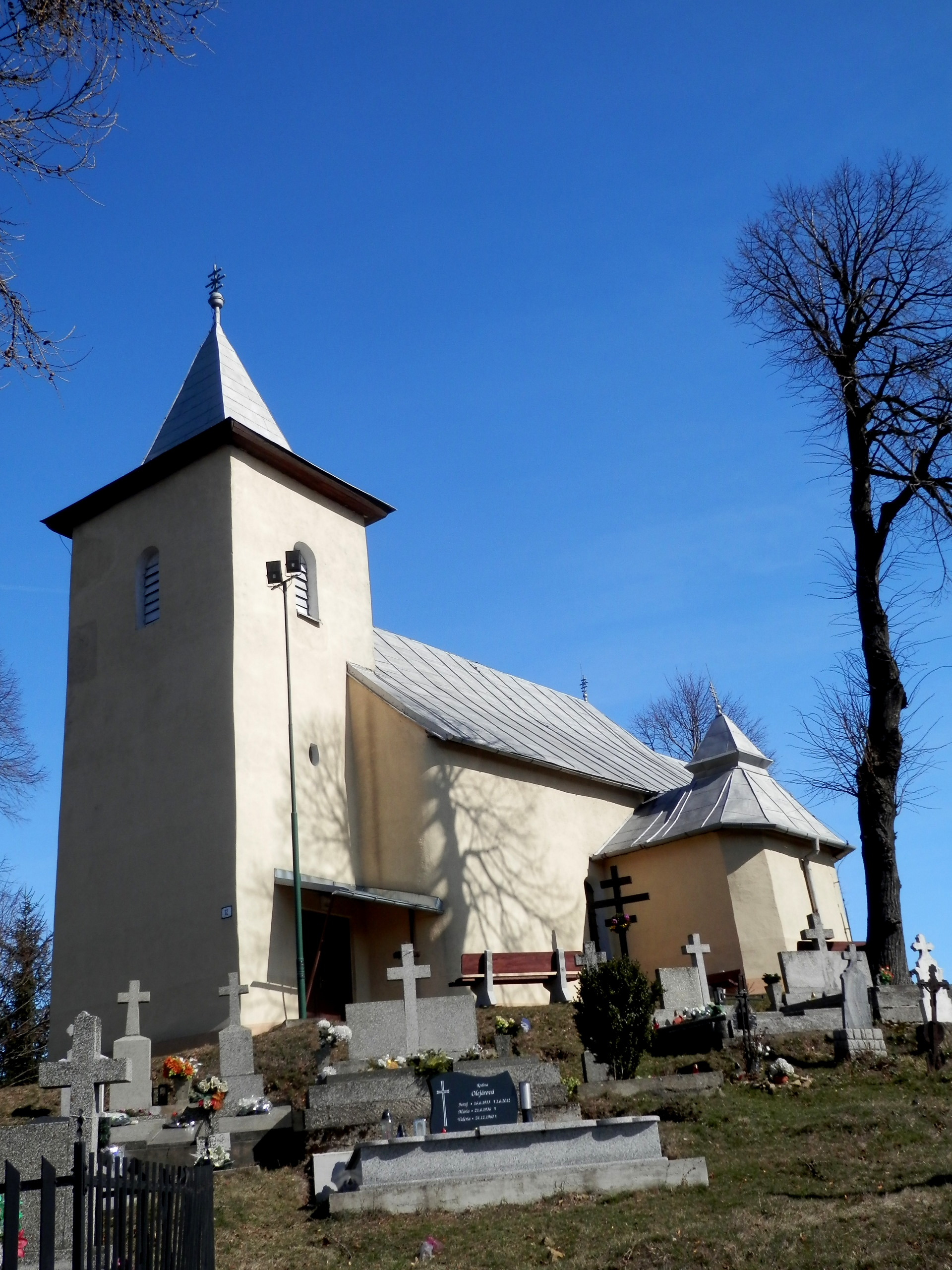 Kostol v Hradisku, obec Terňa okres Prešov.Národná kultúrna pamiatka